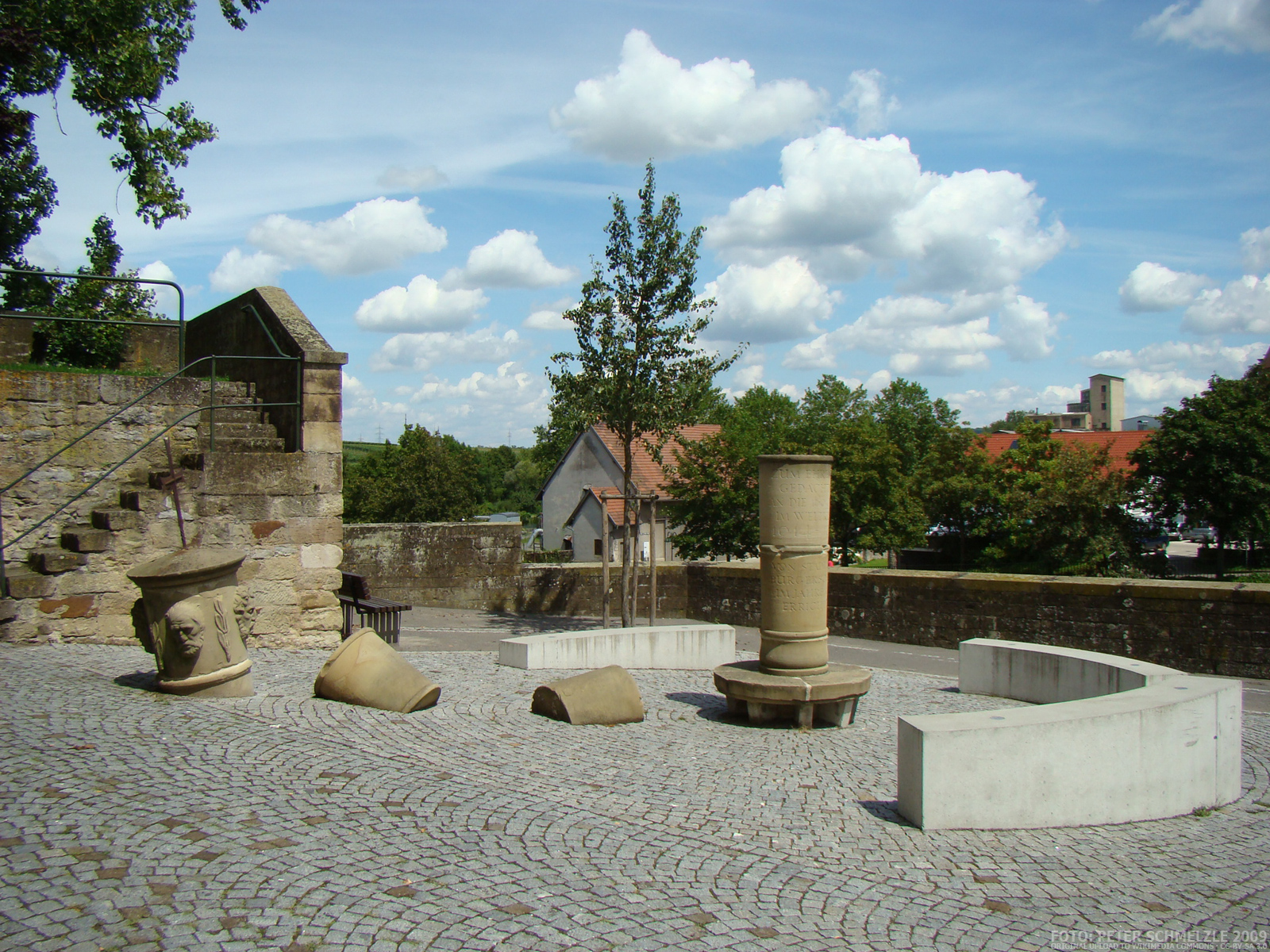 Kriegerdenkmal in Lauffen am Neckar